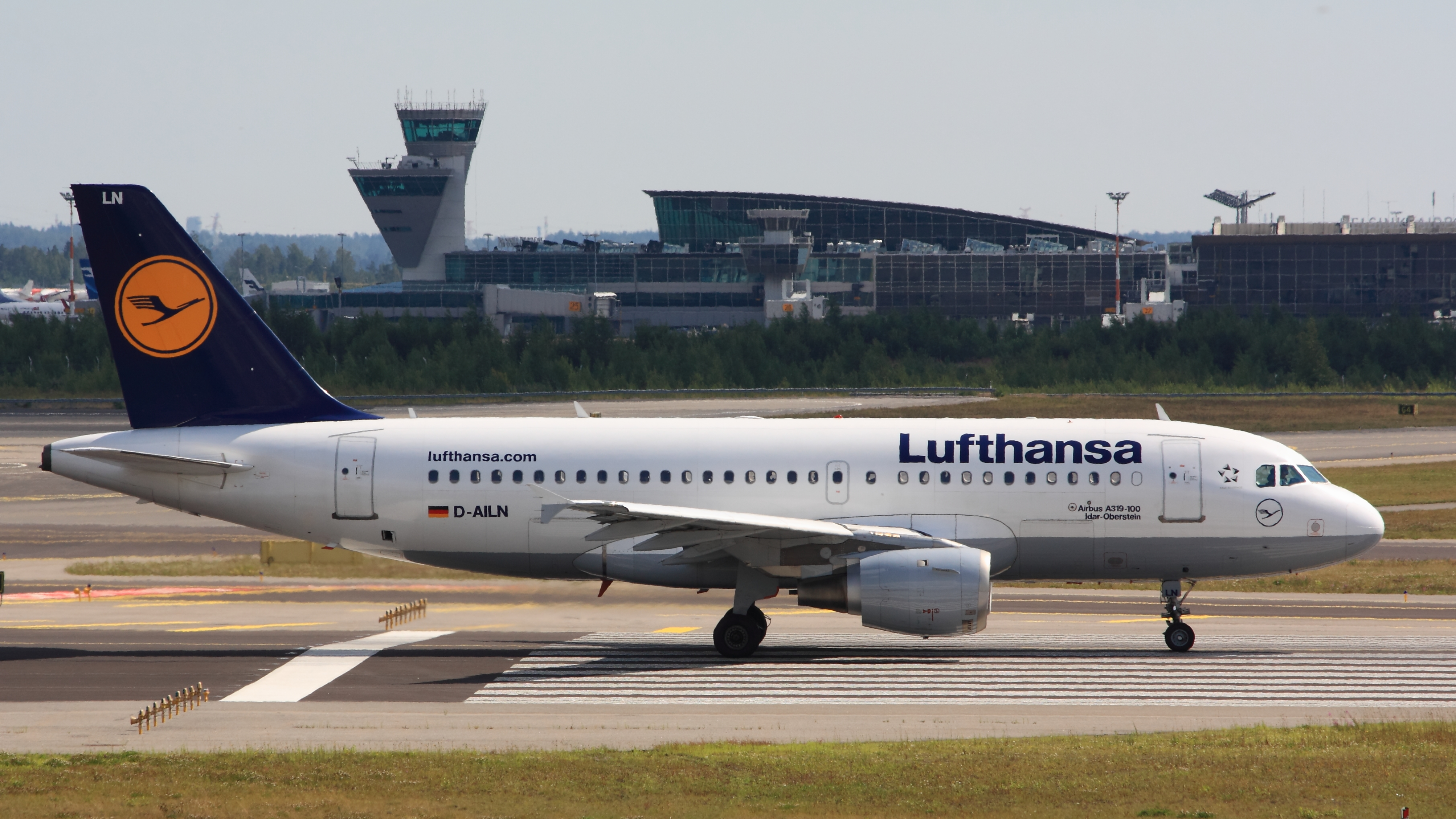 D-AILN Lufthansa Airbus A319 "Idar-Oberstein" Helsinki-Vantaa (HEL) departure rwy 22R